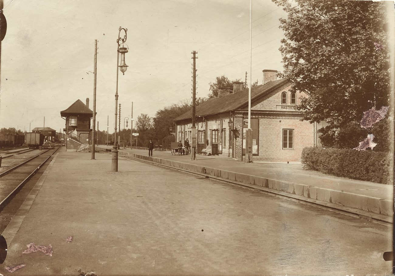 B4088 Järnvägsstationen i Hästveda. The Railway station in Hästveda, Sweden. Photo: Okänd/ Unknown.